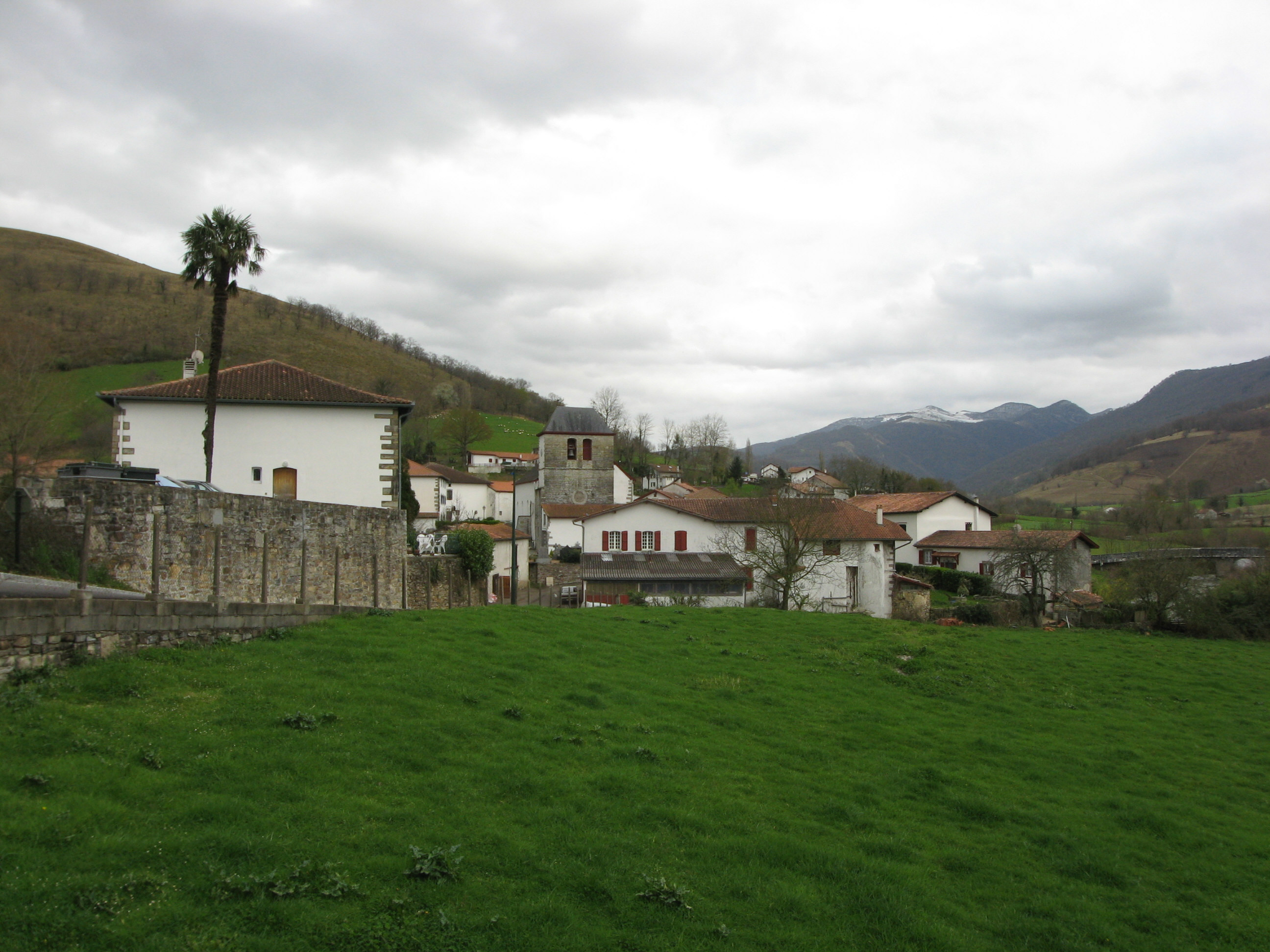 Musculdy (Soule) (Pyrénées-Atlantiques) (Pyrénées).